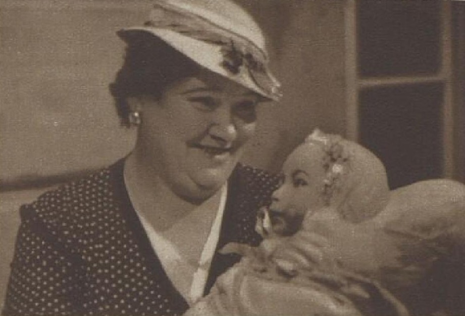 Betty Kysilková (1879-1951), česká divadelní a filmová herečka